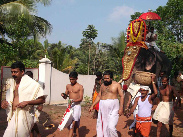 Aarattu